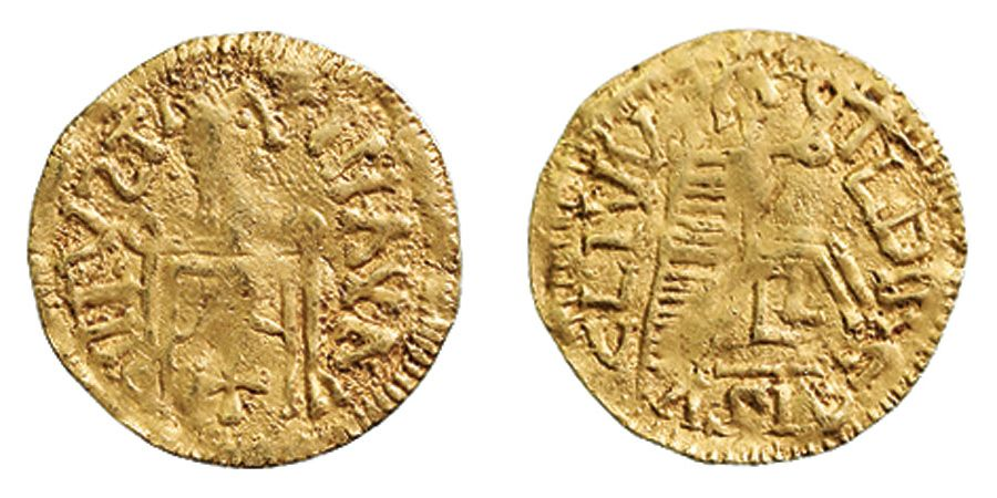 Tremis visigodo de oro del reinado de Leovigildo. Sin ceca. A nombre de Justiniano. Fuente: Ruth Pliego, La Moneda Visigoda, 2009, 1b. Conservación: BC+.